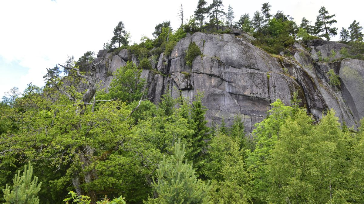 Røysa naturreservat har utfordrende terreng. Her det høyeste partiet.